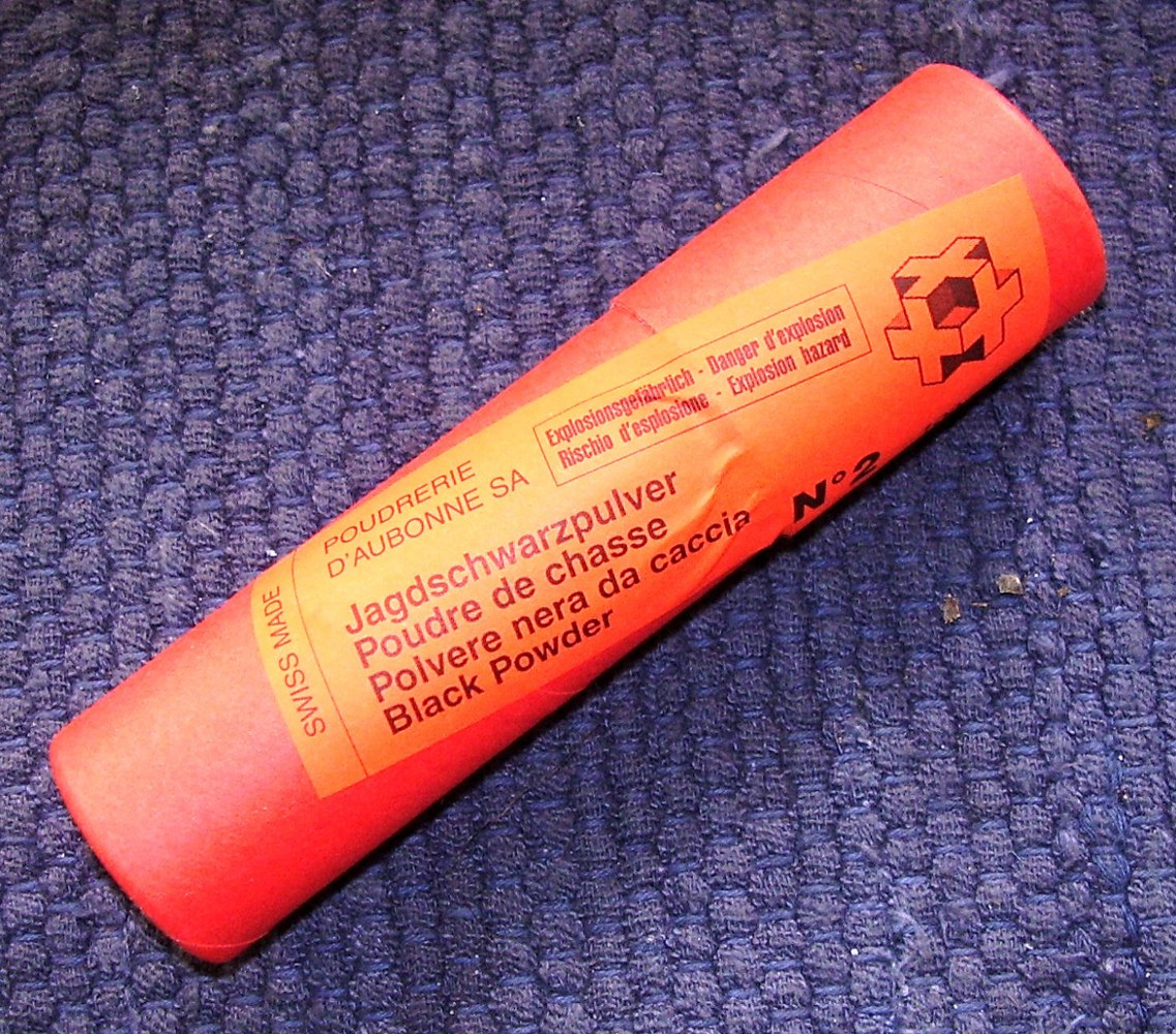 Behälter mit Jagdschießpulver